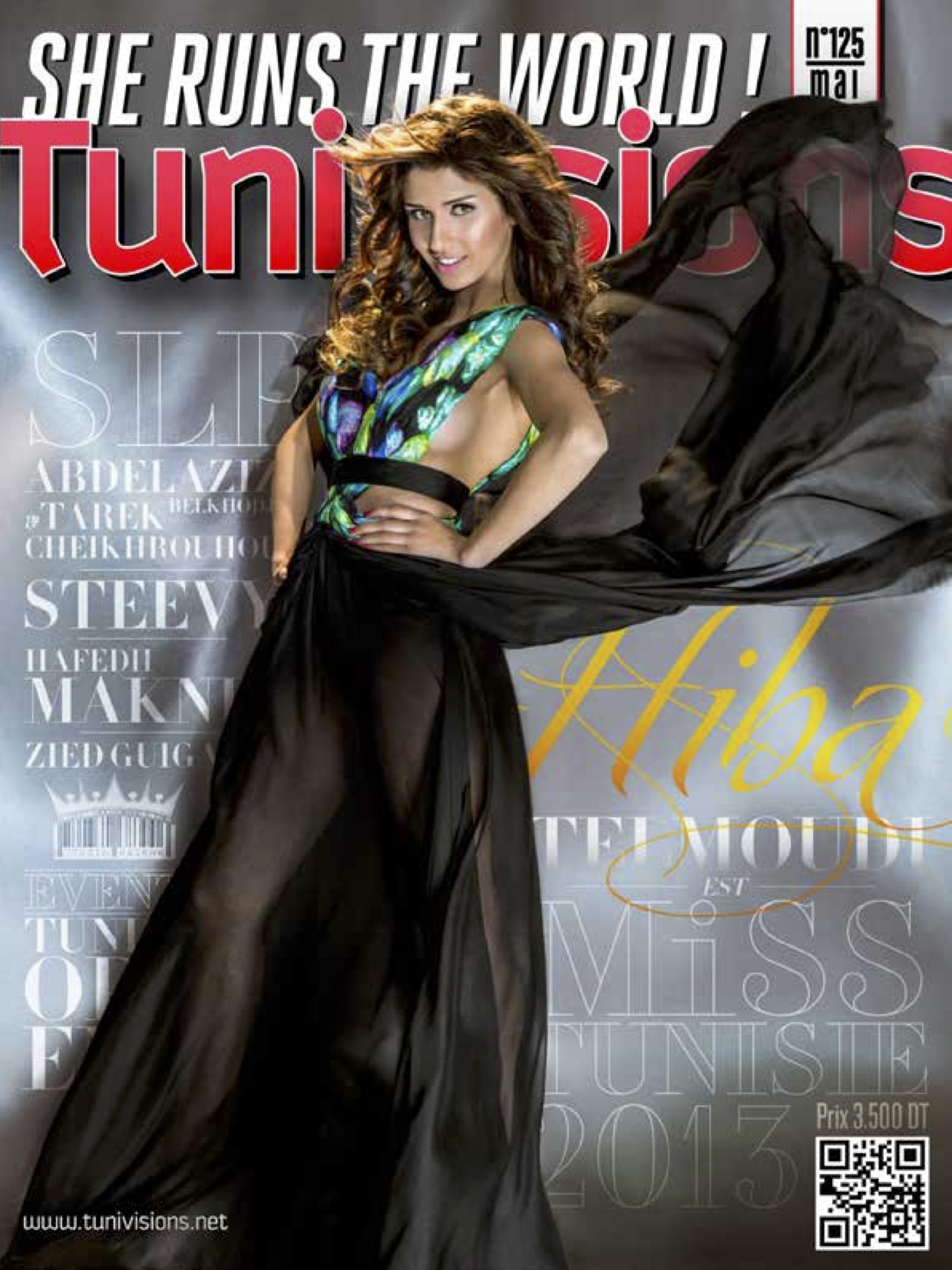 Couverture du numéro 125 du magazine tunisien Tunivisions.